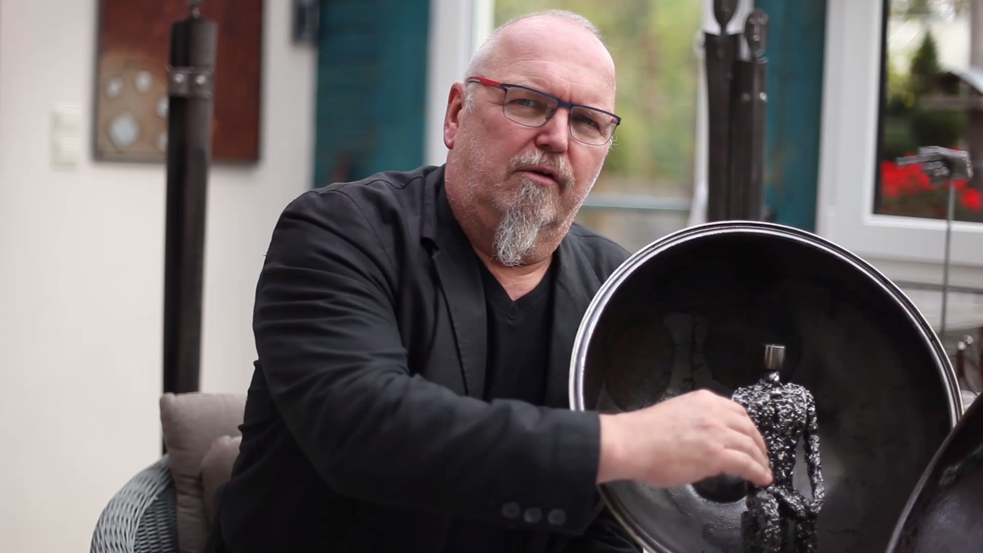 Portait Willi Arlt